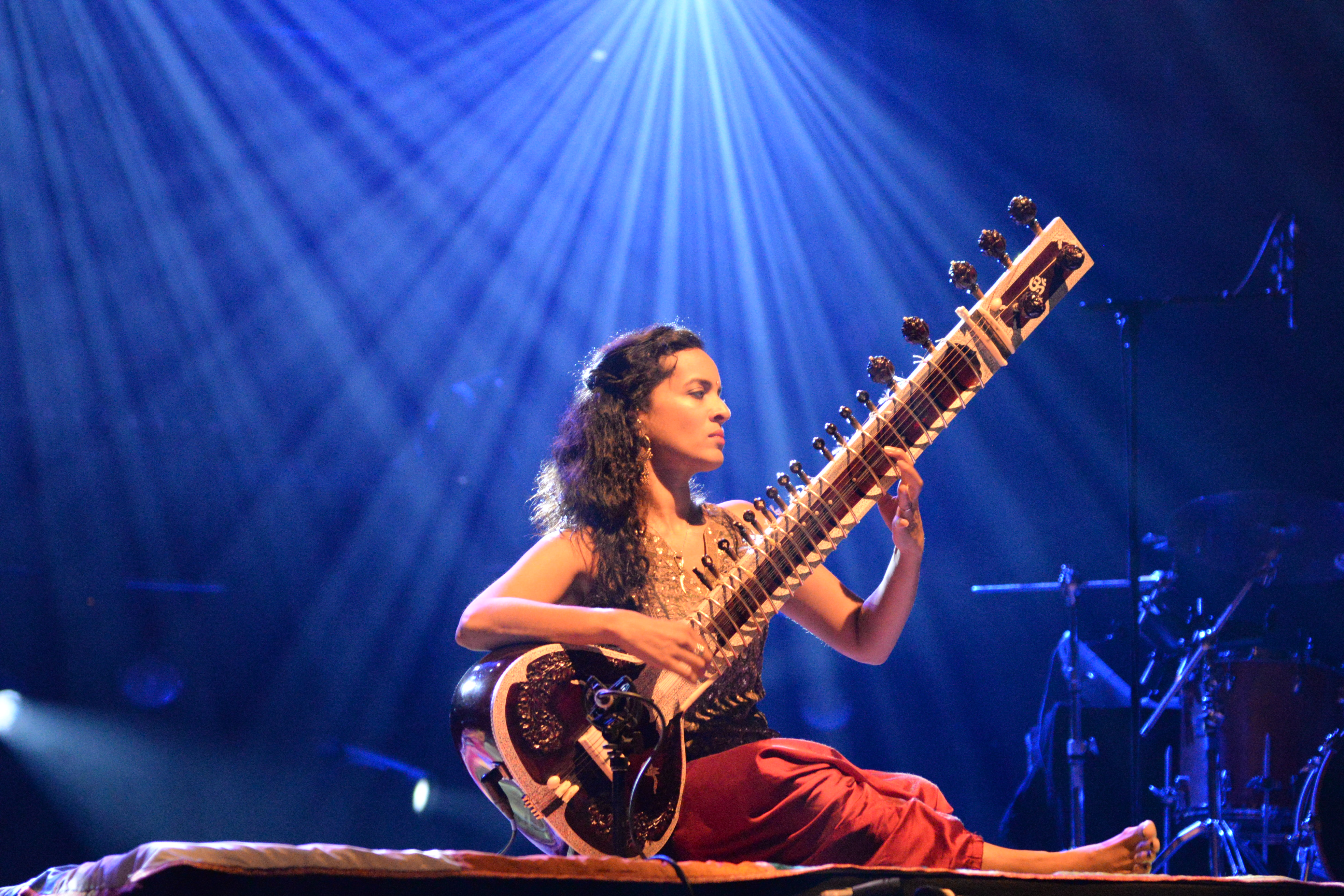 Concert de Anoushka Shankar du 6 août 2014 au Festival Interceltique de Lorient 2014